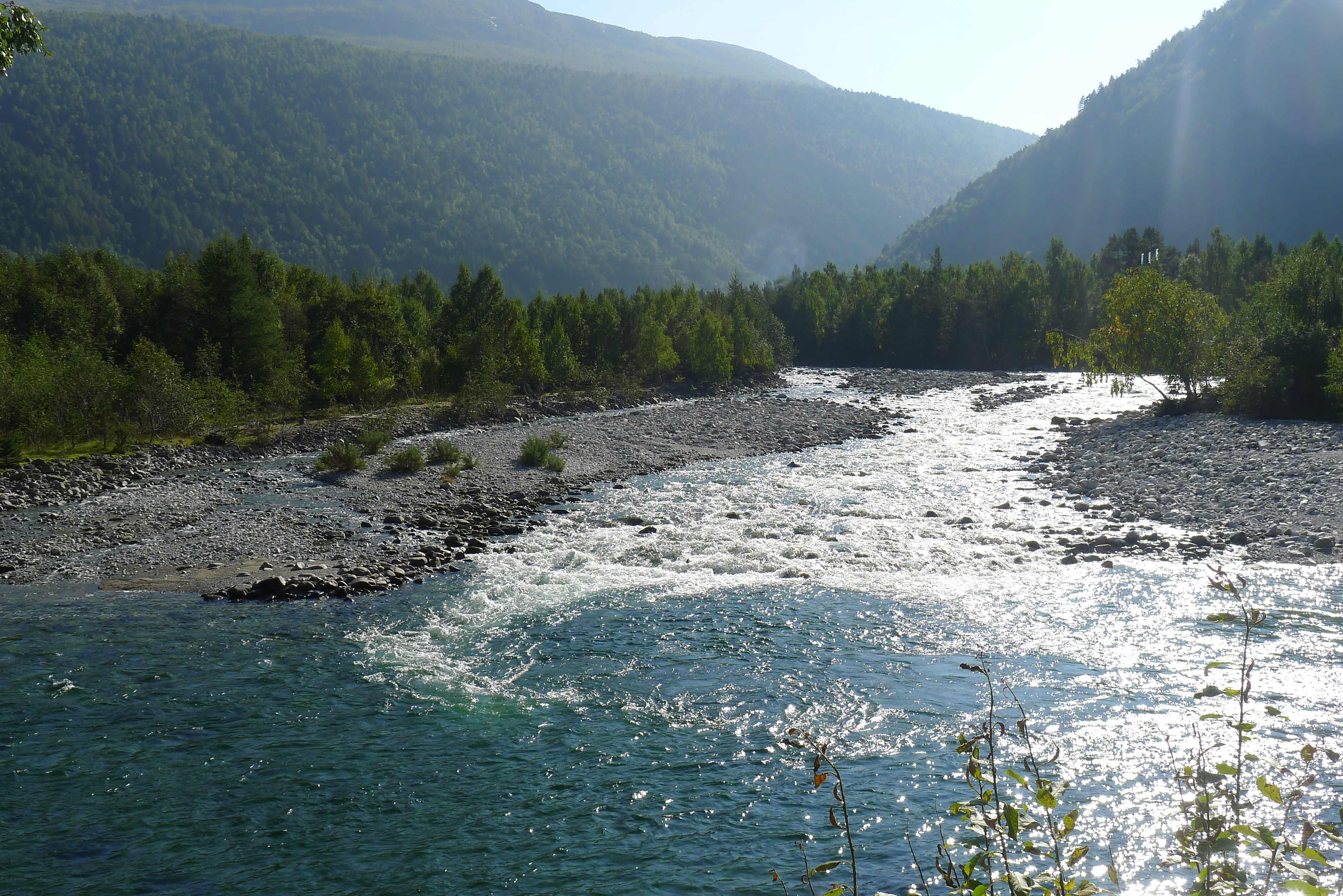 Grøvus samløp i Driva